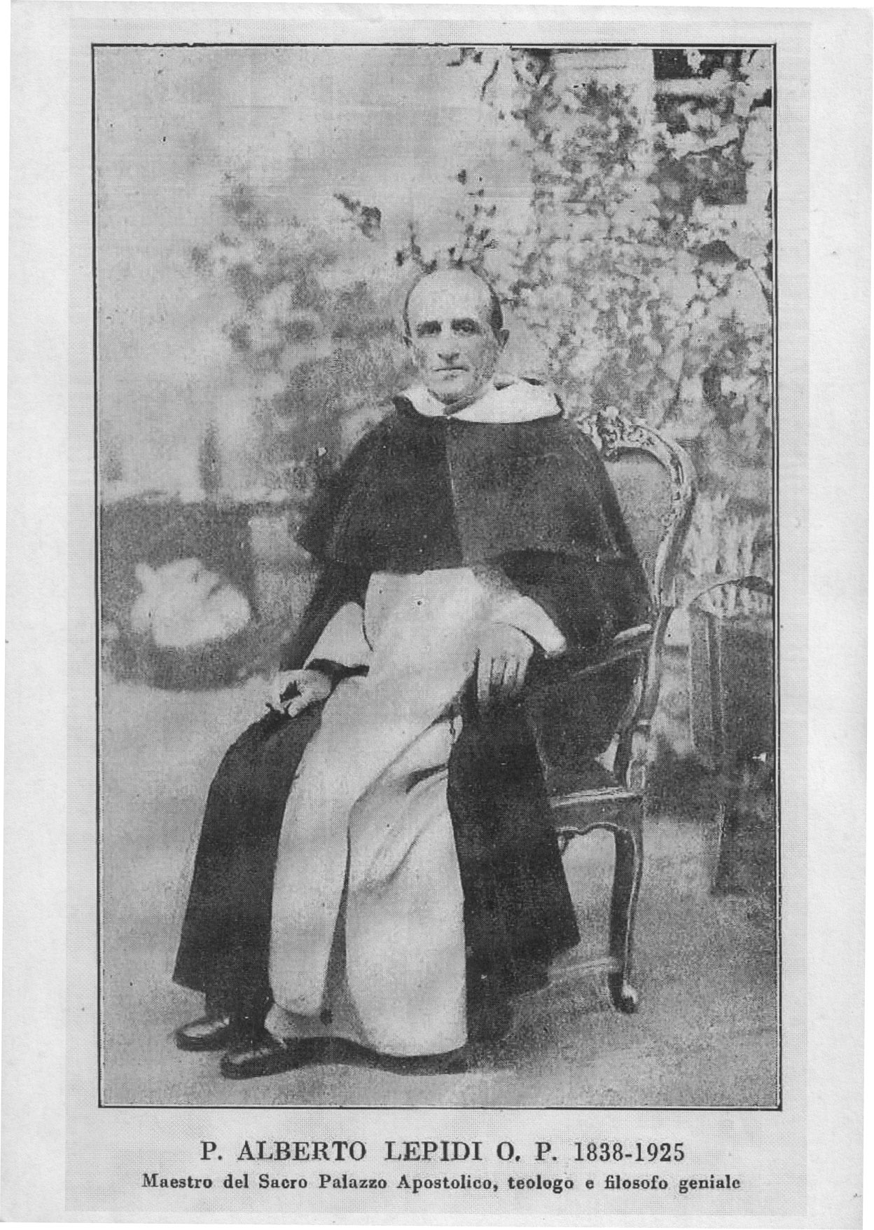 Rev.mo Padre Alberto Lepidi Chioti OP, Maestro dei Sacri Palazzi Apostolici